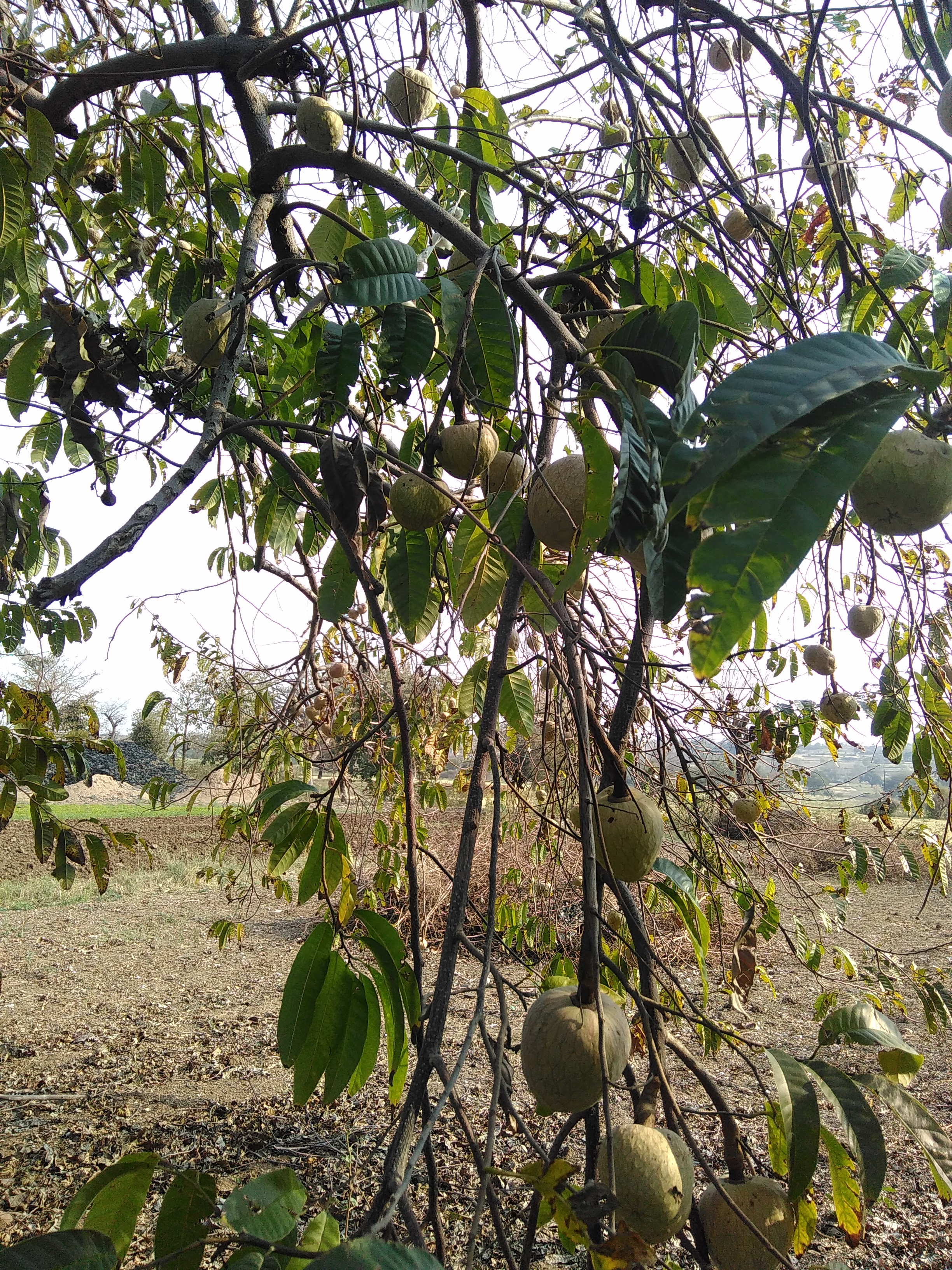 महाराष्ट्रातील गोदरी (ता. चिखली, जि. बुलढाणा) गावातील रामफळ